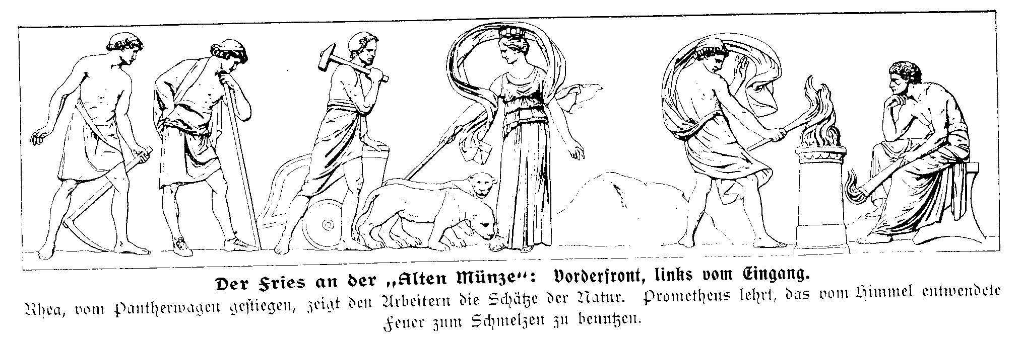 Münzfries von Johann Gottfried Schadow, Teil 1.